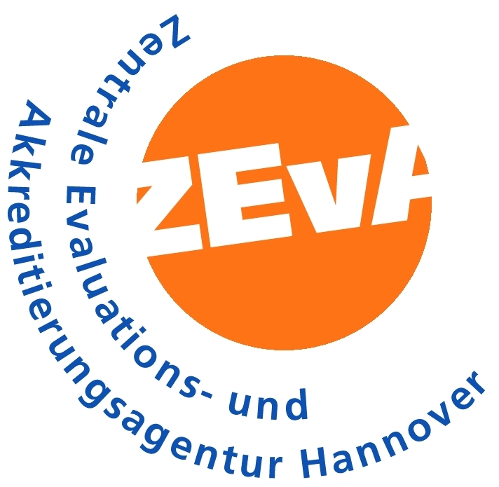 Logo der Zentralen Evaluations- und Akkreditierungsagentur (ZEvA) Hannover